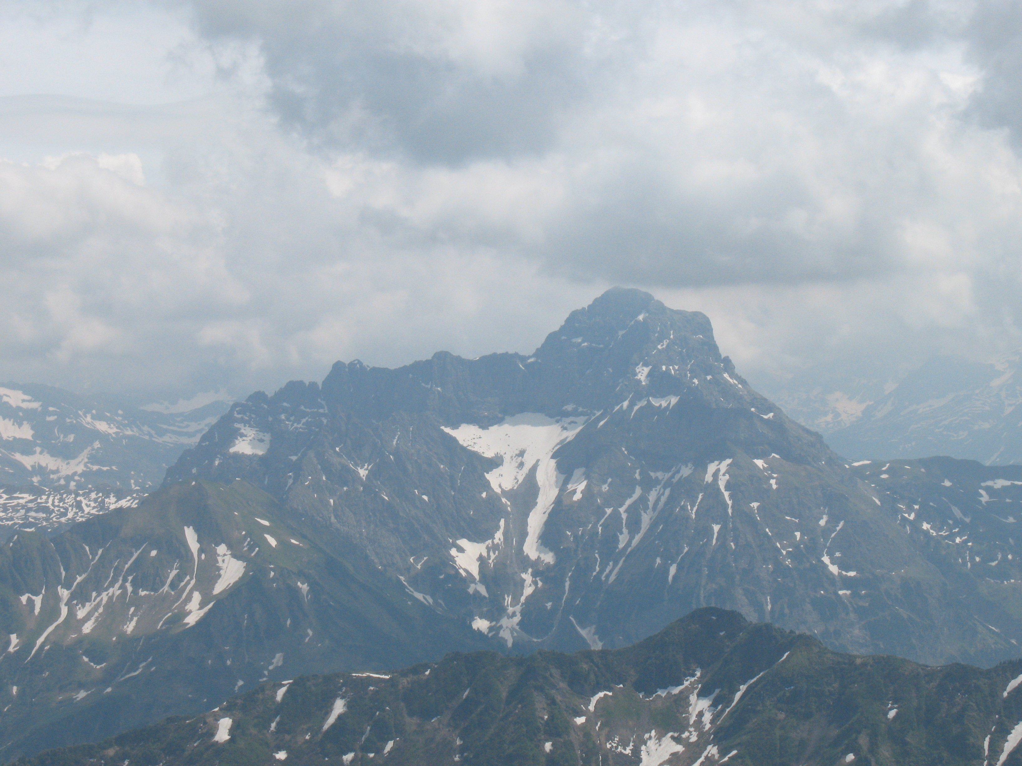 Großer Widderstein (2.533 m) vom Hohen Ifen aus gesehen.